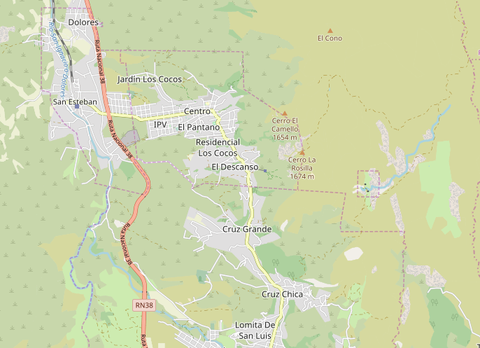 Mapa de ubicación Cerro La Rosilla, Los Cocos, Córdoba